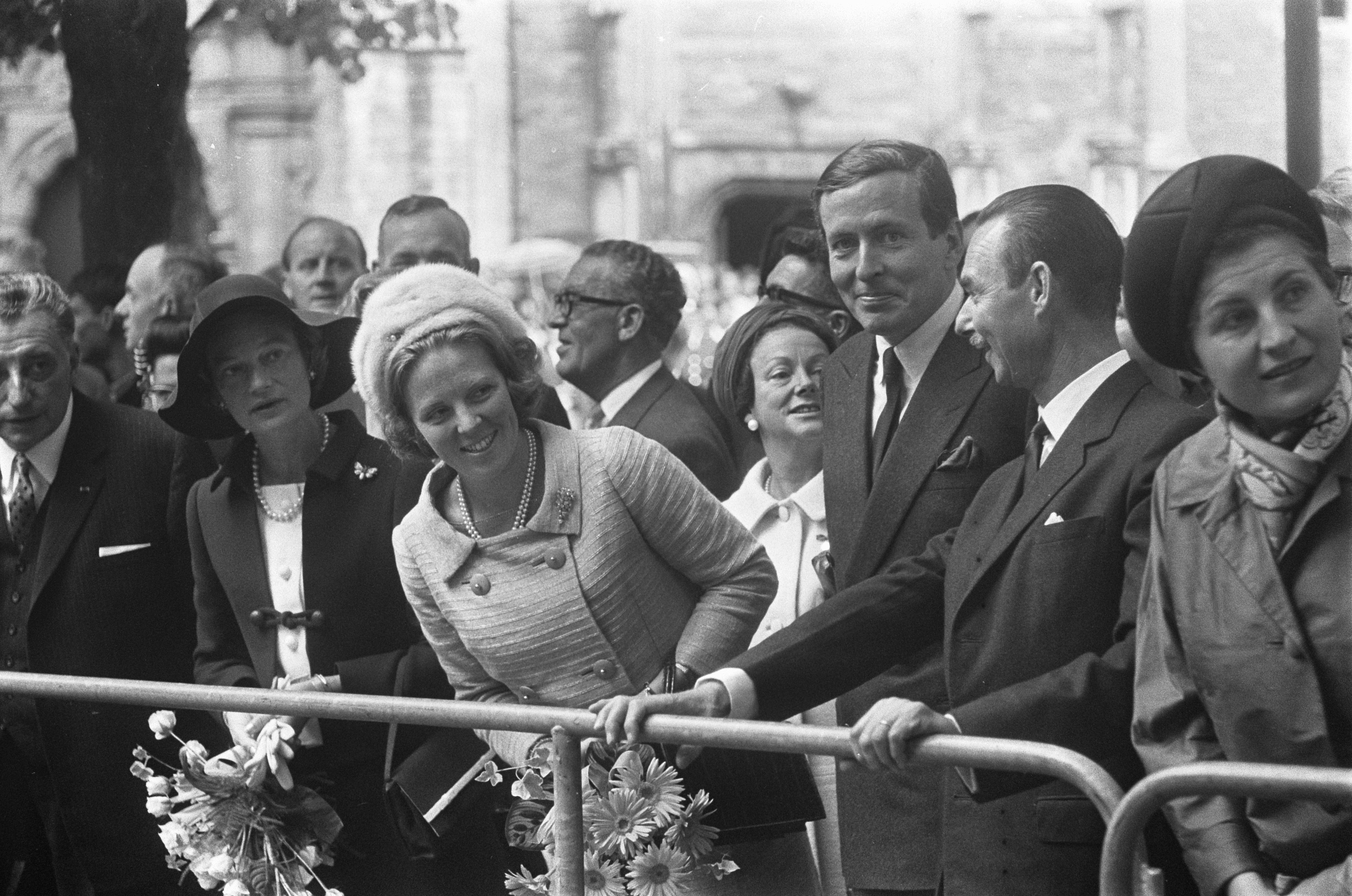 Collectie / Archief : Fotocollectie Anefo Reportage / Serie : [ onbekend ] Beschrijving : Koninklijk bezoek naar Zeeland. Groothertogin, prinses Beatrix , prins Claus en Groothertog vol belangstelling voor ringsteken Datum : 14 september 1967 Locatie : Zeeland Trefwoorden : Groothertoginnen, RINGSTEKEN, bezoeken, groothertogen, prinsessen Persoonsnaam : Beatrix, prinses, Claus, prins Fotograaf : Koch, Eric / Anefo Auteursrechthebbende : Nationaal Archief Materiaalsoort : Negatief (zwart/wit) Nummer archiefinventaris : bekijk toegang 2.24.01.05 Bestanddeelnummer : 920-7025 Reacties Geplaatst door Maaike op 17 juli 2013 - 21:02. Plaats: Middelburg Persoonsnamen: Groothertogin van Luxemburg, Josephine Charlotte; Groothertog van Luxemburg, Jan